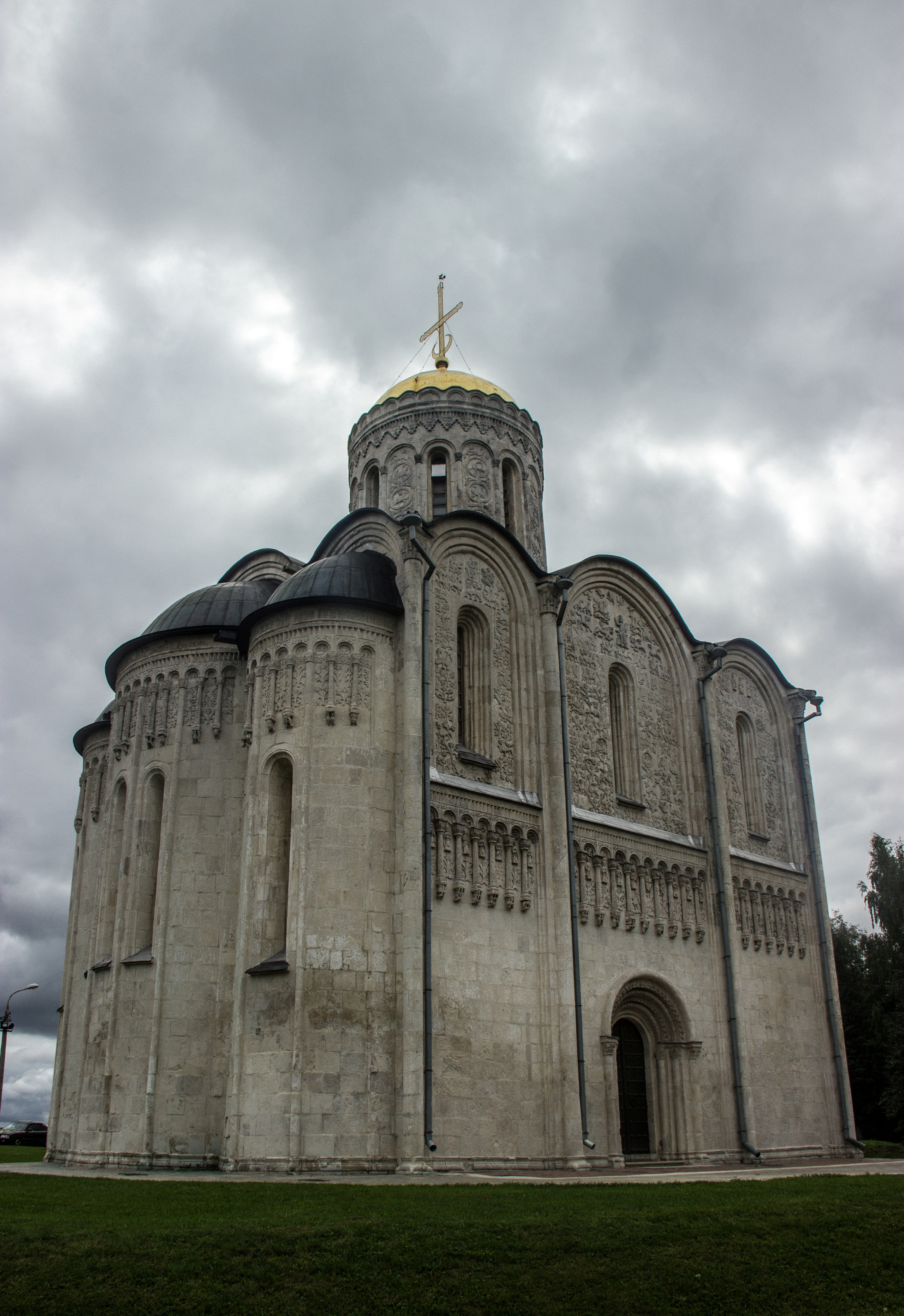 Собор Димитрия Солунского (Дмитриевский): улица Большая Московская, 60, Владимир, Владимирская область